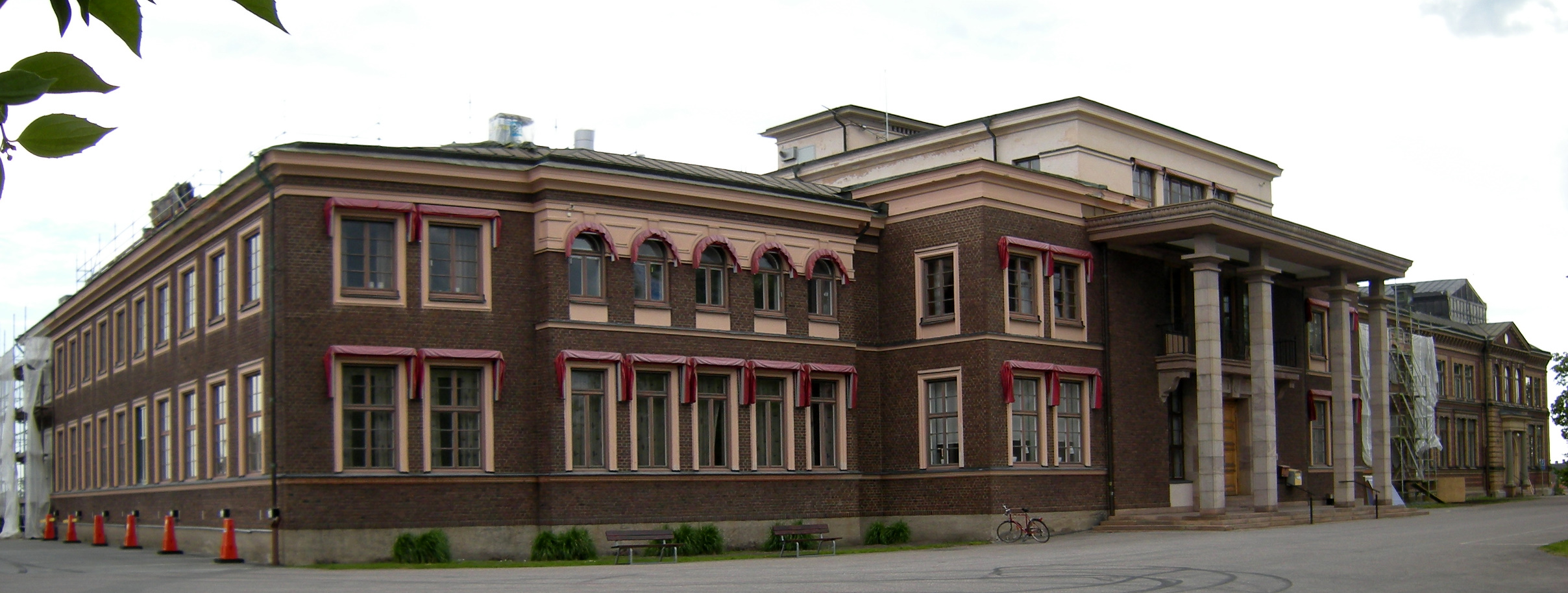 Sandviks huvudkontor i Sandviken. Bergslagssafari 2010.